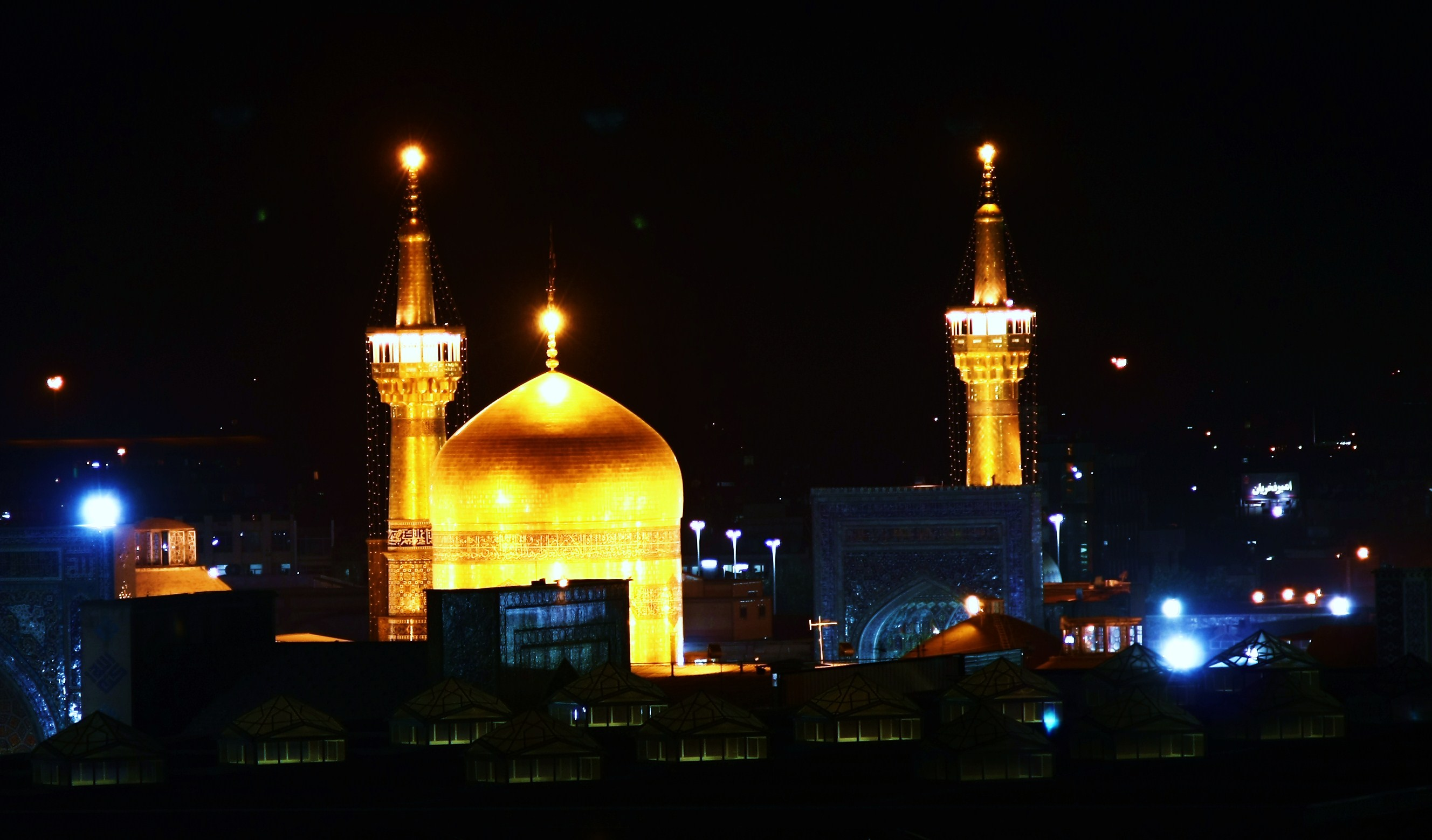 حرم امام رضا (ع) مشهد مقدس